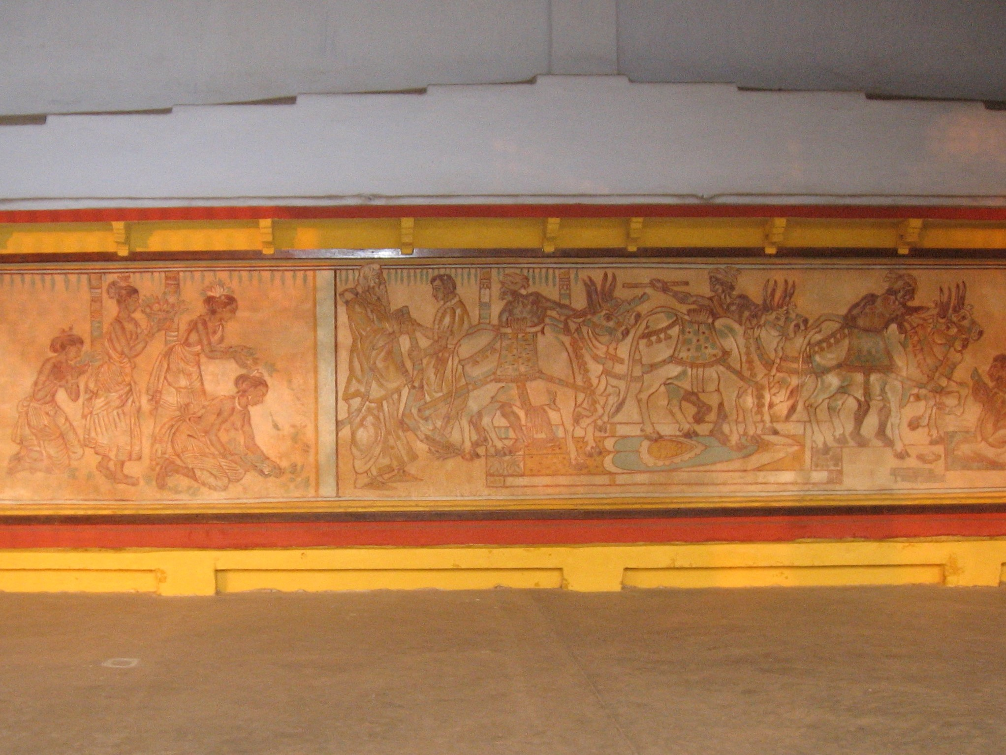 Mural by Nandalal Bose at Sriniketan